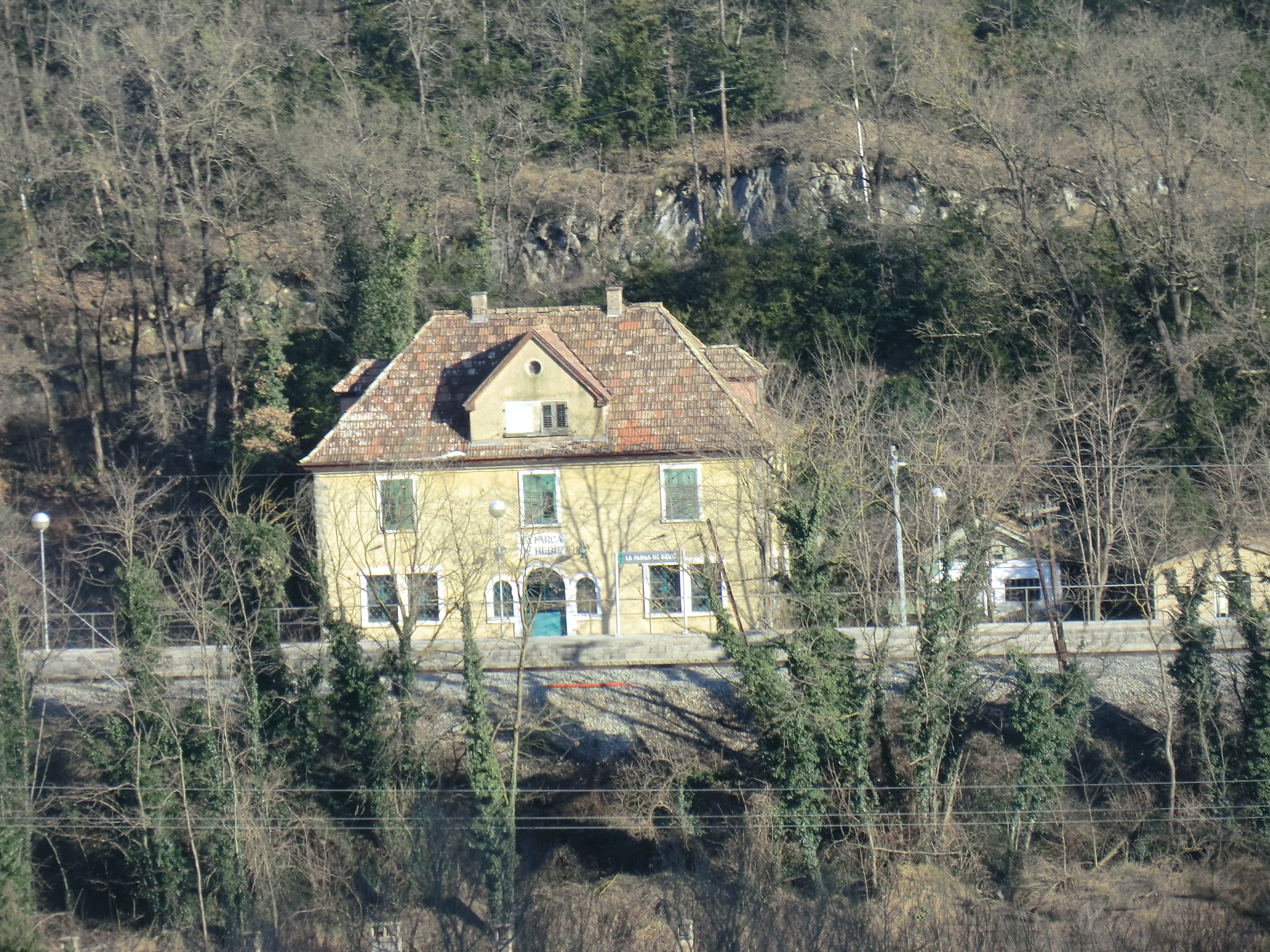 Estació de la Farga de Bebié